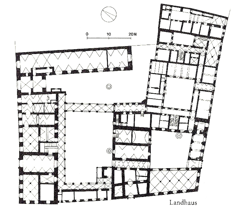 Grundriss des Grazer Landhauses